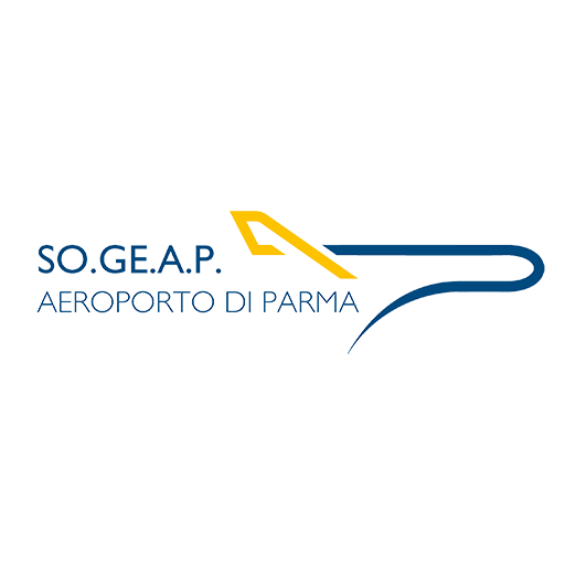 Найдено в Интернете. Есть на сайте аэропорта.